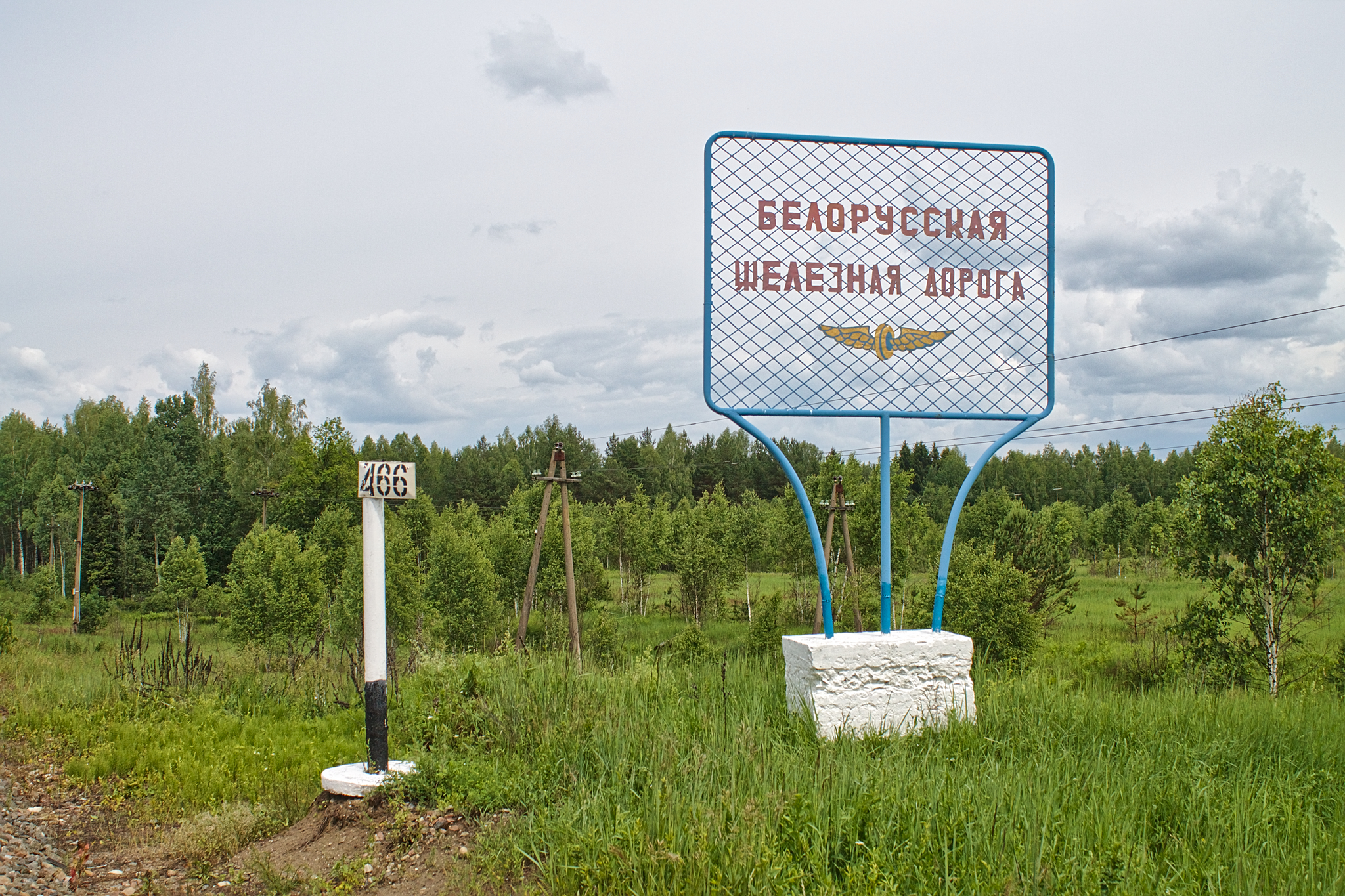 Табличка на границе Московской ЖД (Россия) и Белорусской ЖД (Беларусь). см. фото 601059 в альбоме автора